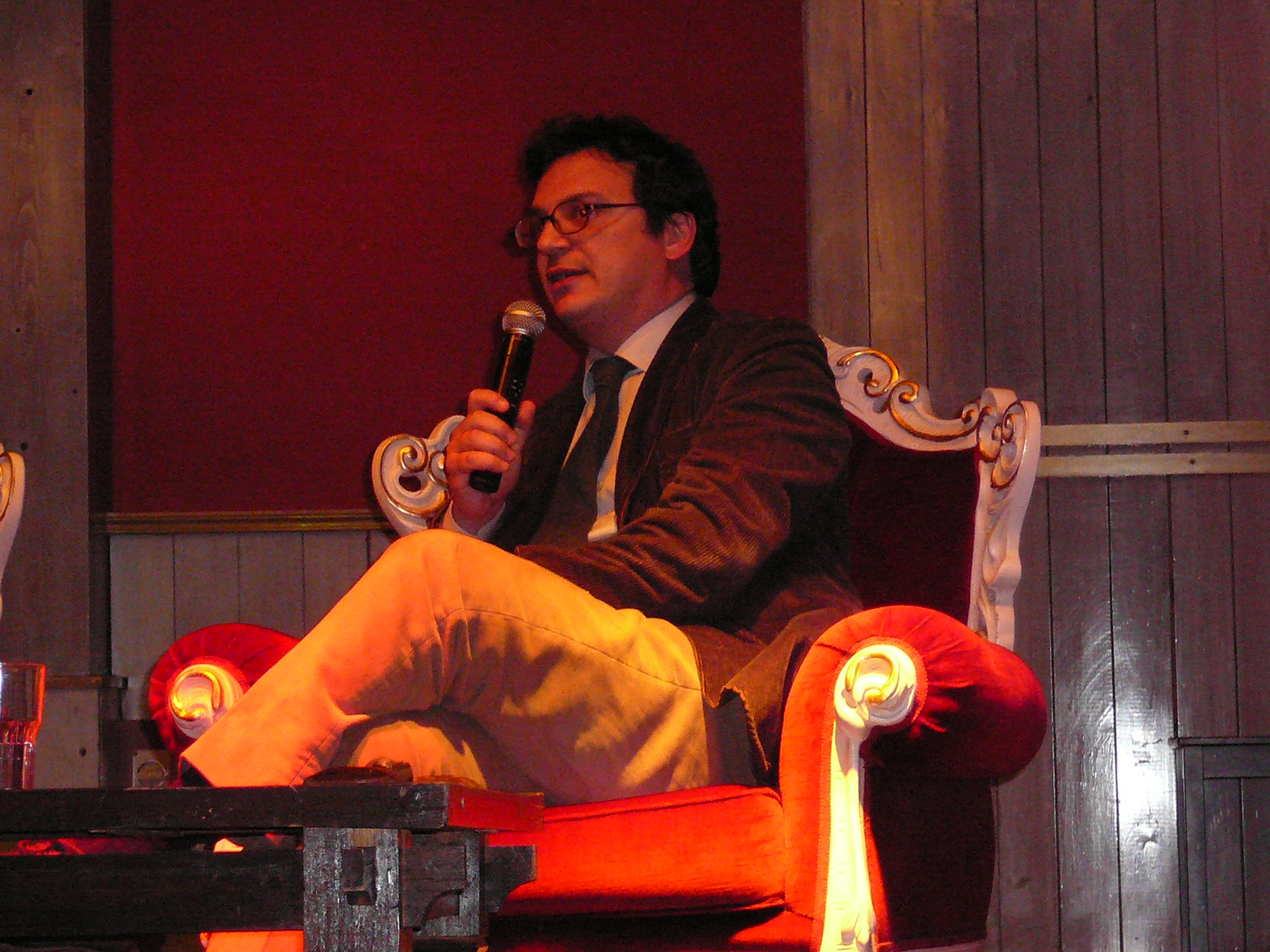 Stefano Bartezzaghi